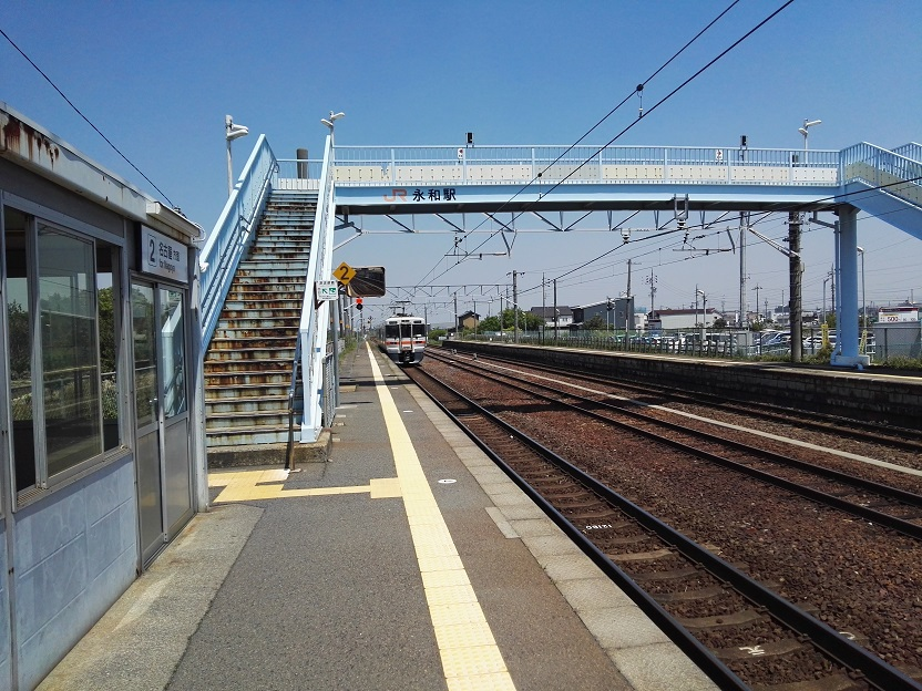 JR Eiwa station platform